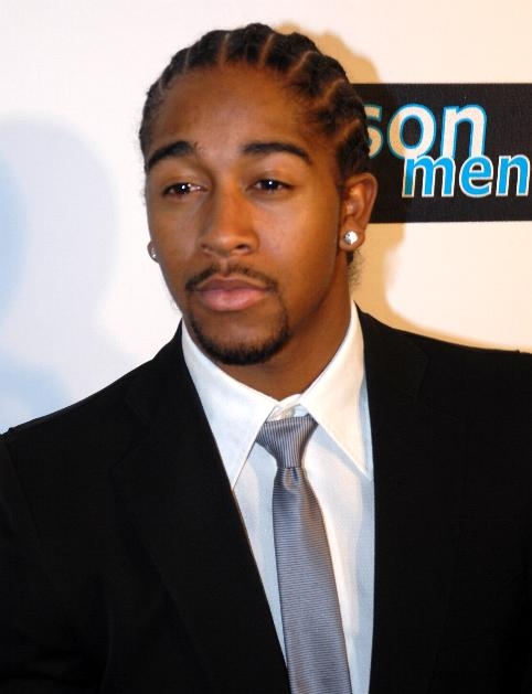 Singer Omarion